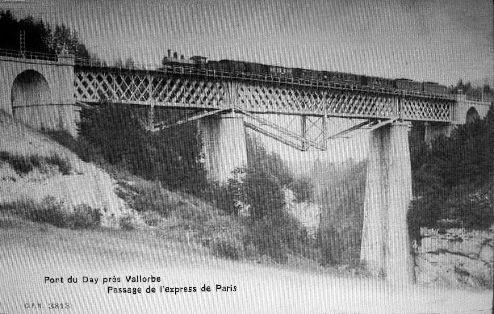 Viadukt von Le Day mit einem aus Paris kommenden Schnellzug